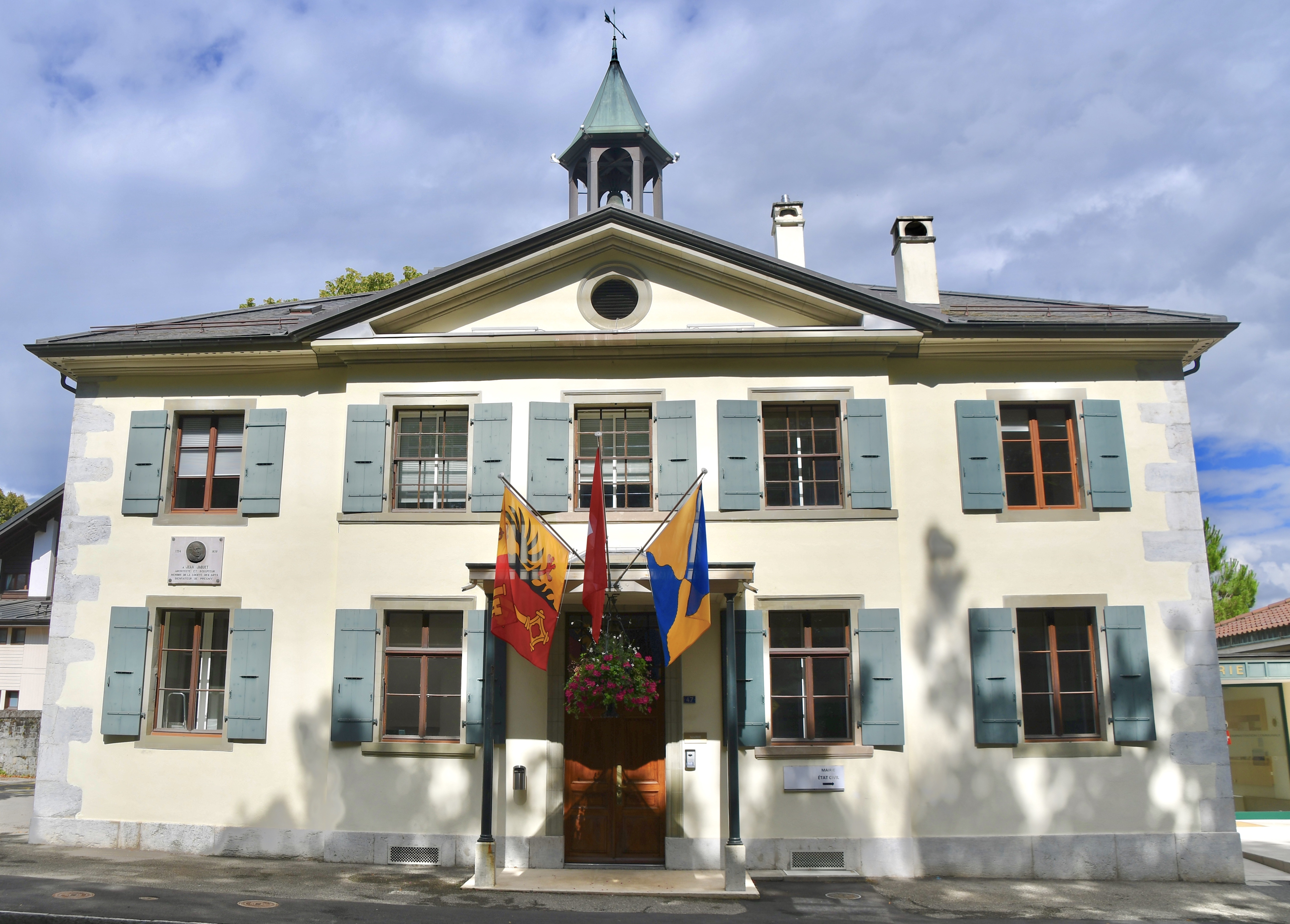 Mairie de Pregny-Chambésy avec l'église Sainte-Pétronille.